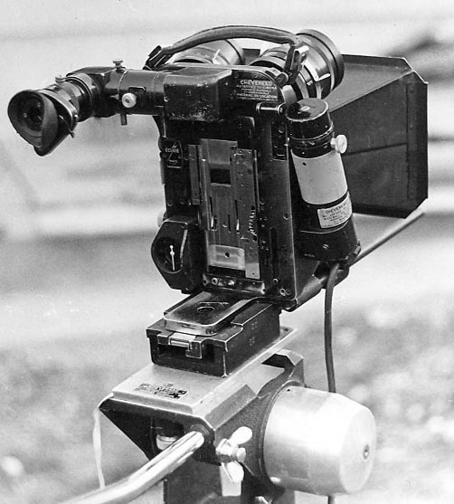 Vue arrière de la célèbre caméra de la société française Éclair, le "Caméflex" ("Camerette" aux USA). Le magasin de pellicule a été enlevé. Cette caméra est ici au format 35 mm, mais existait aussi en bi-format (35 et 16 mm).